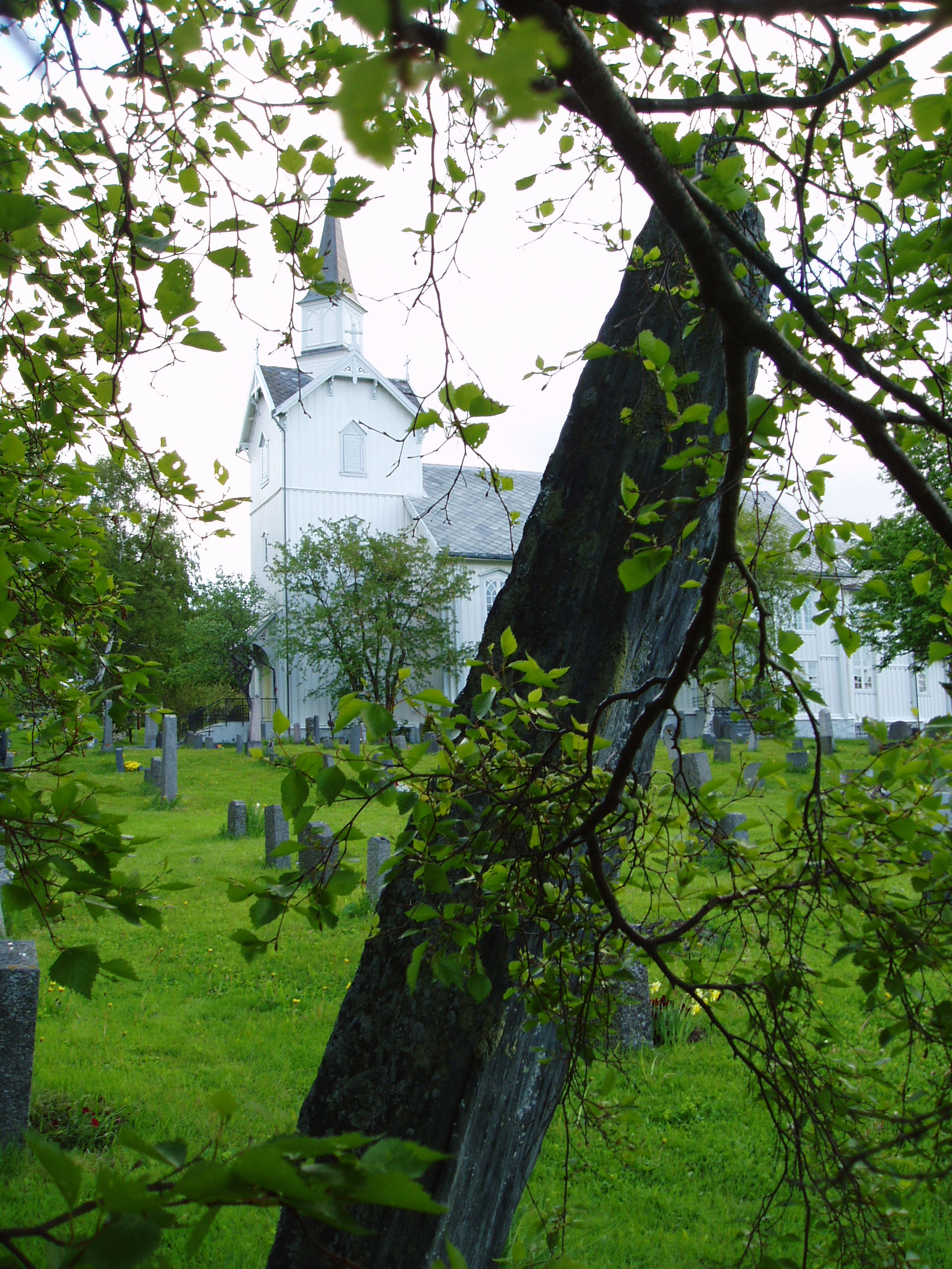 Bautasteinen Pila, som står utenfor Kvæfjord kirke. Har et sagn tilknyttet seg.